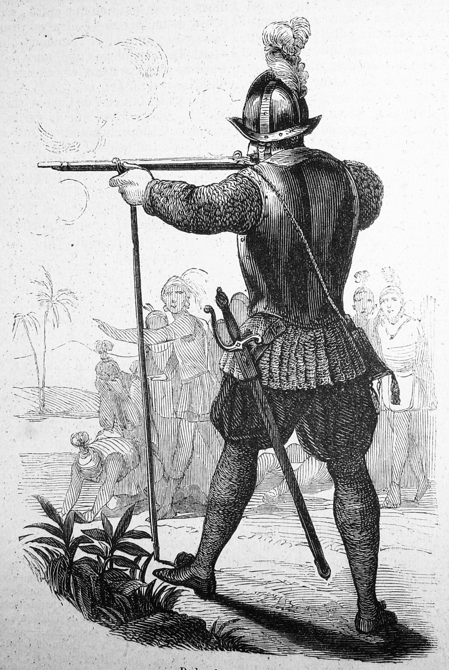 Puede acceder al libro completo en el siguiente enlace : Historia de la conquista del Perú : con observaciones preliminares sobre la civilización de los incas / por Guillermo H. Prescott. - Madrid : Gaspar y Roig, 1851